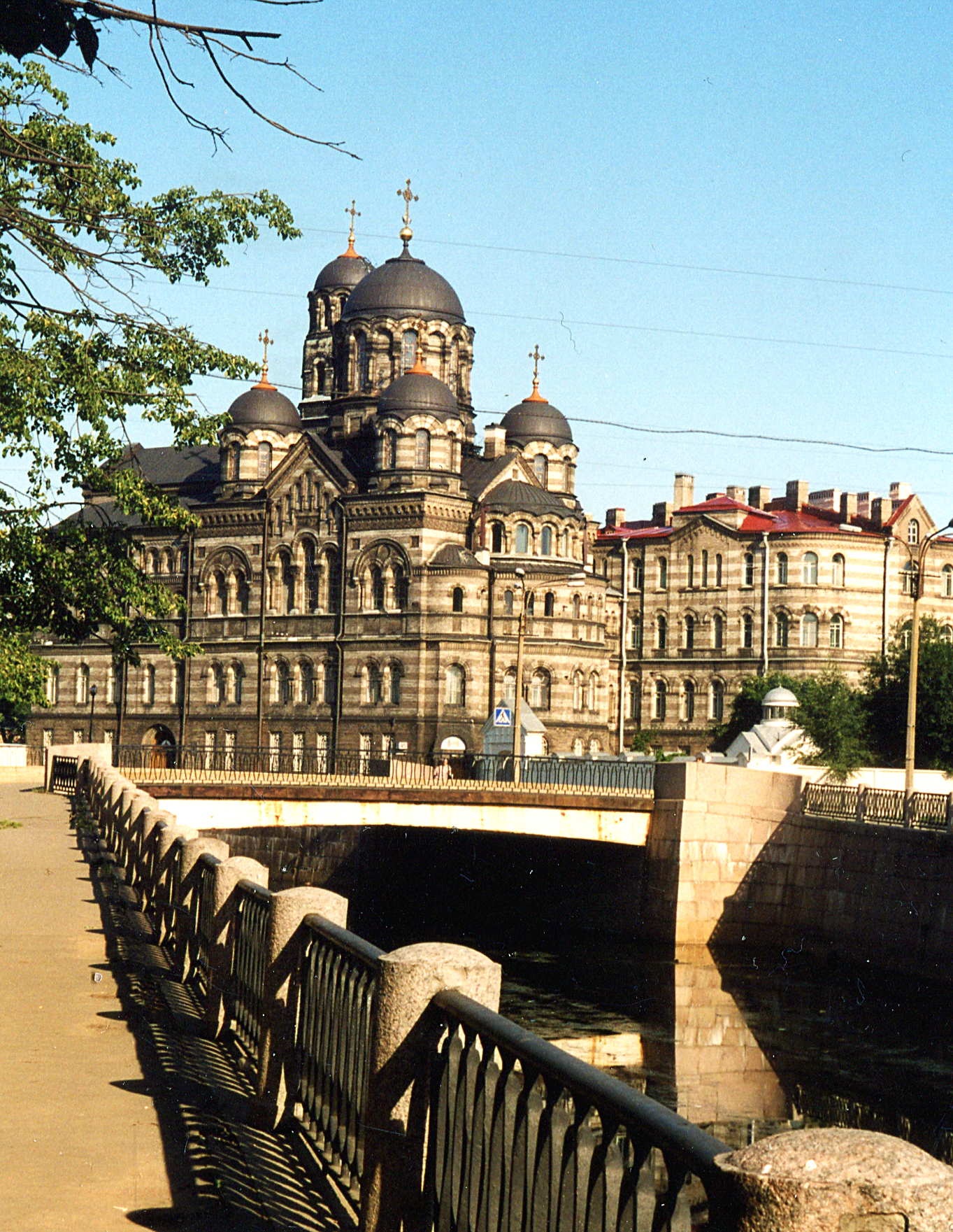 Иоанновский женский монастырь на Карповке